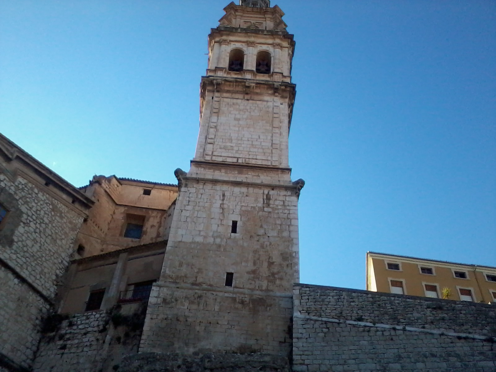 Campanar Esglèsia Santa Maria